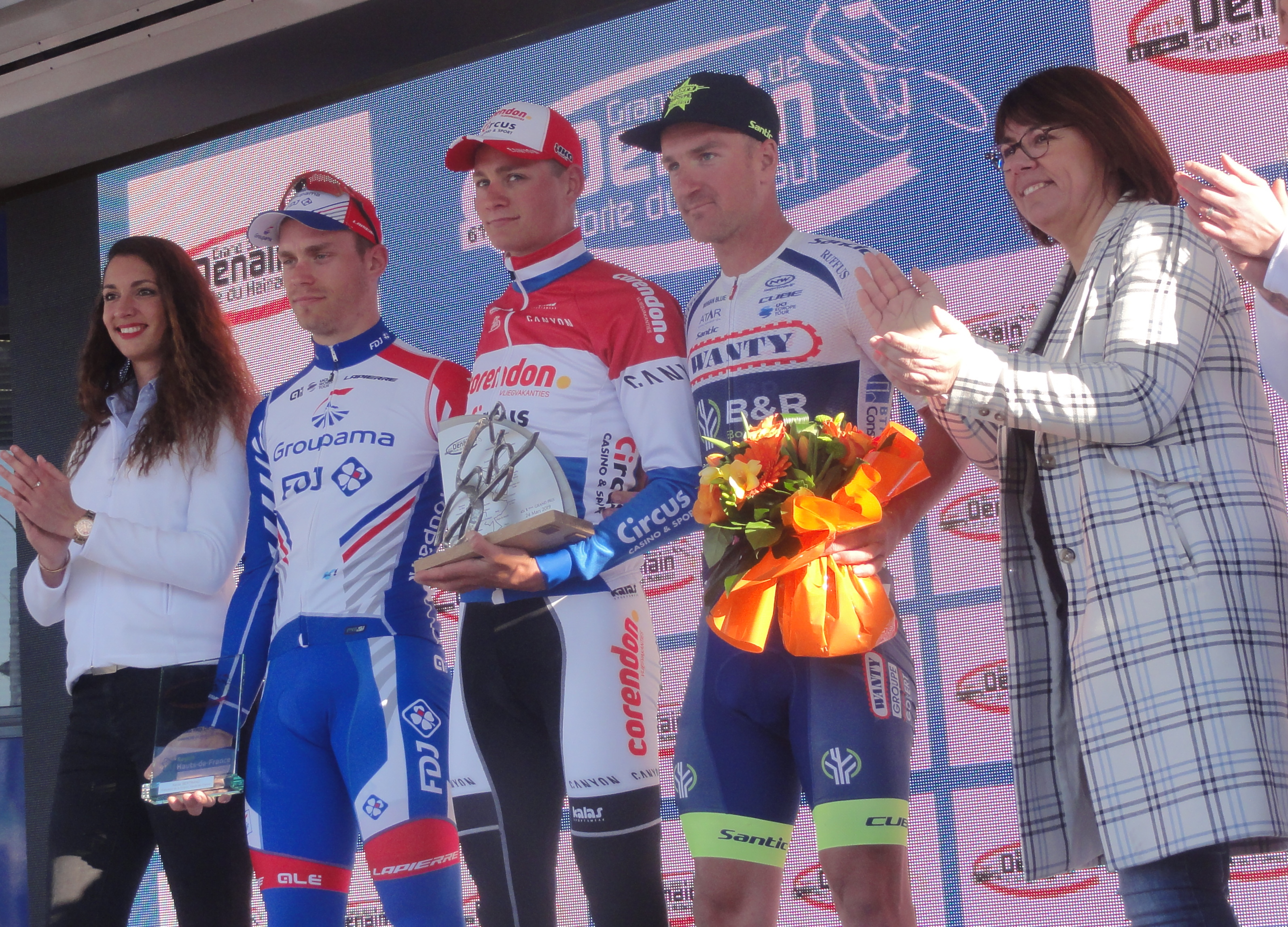 Reportage réalisé le dimanche 24 mars à l'occasion du départ et de l'arrivée du Grand Prix de Denain 2019 à Denain, Nord, Nord-Pas-de-Calais-Picardie, France.